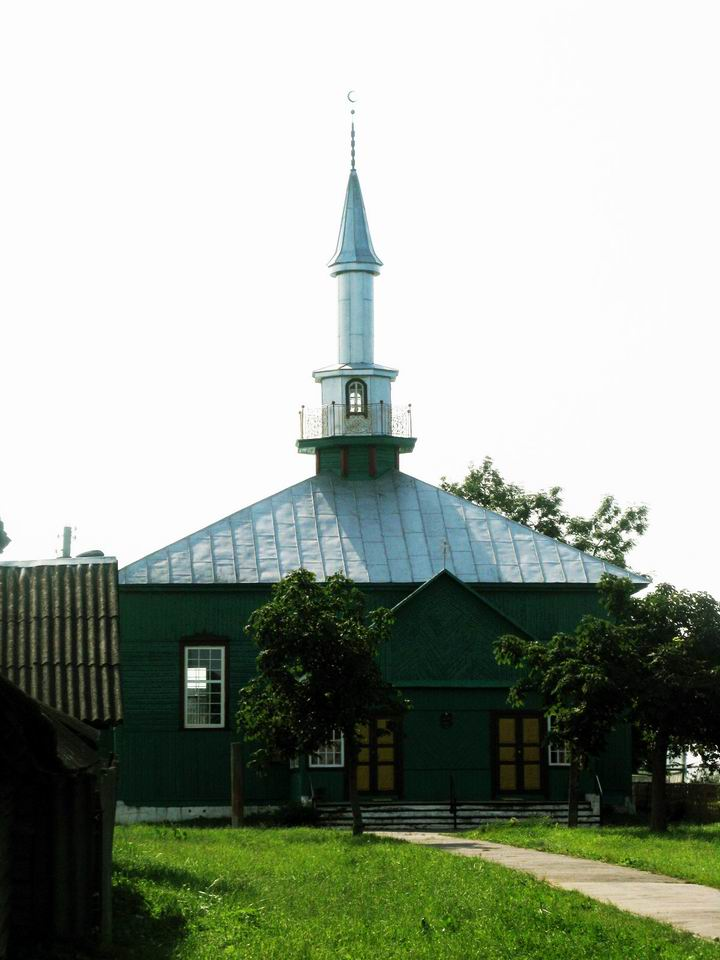 Беларуская (тарашкевіца): Іўе